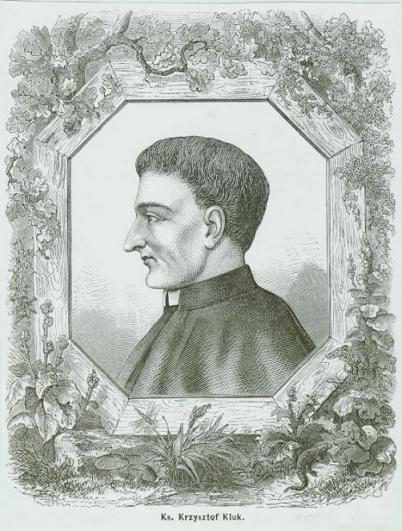 Picture of Jan Krzysztof Kluk